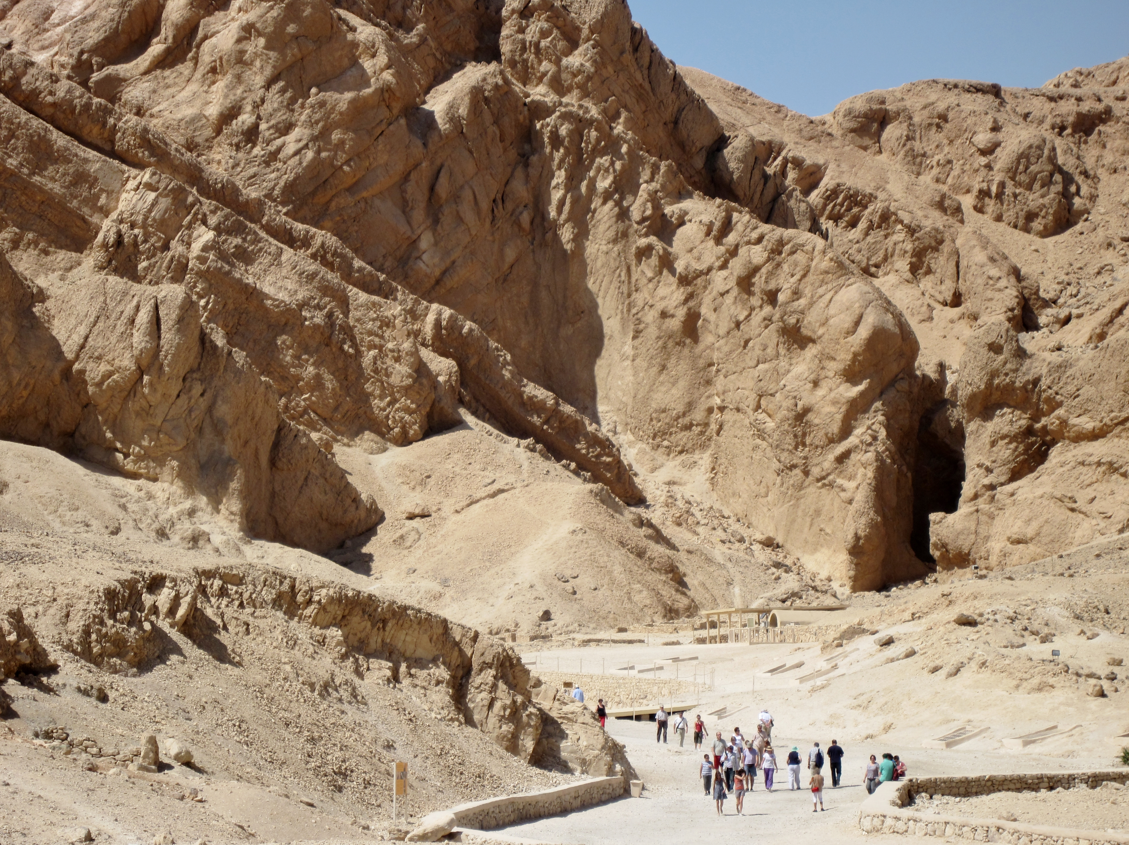 Blick in das Tal der Königinnen, Theben-West (Luxor), Ägypten